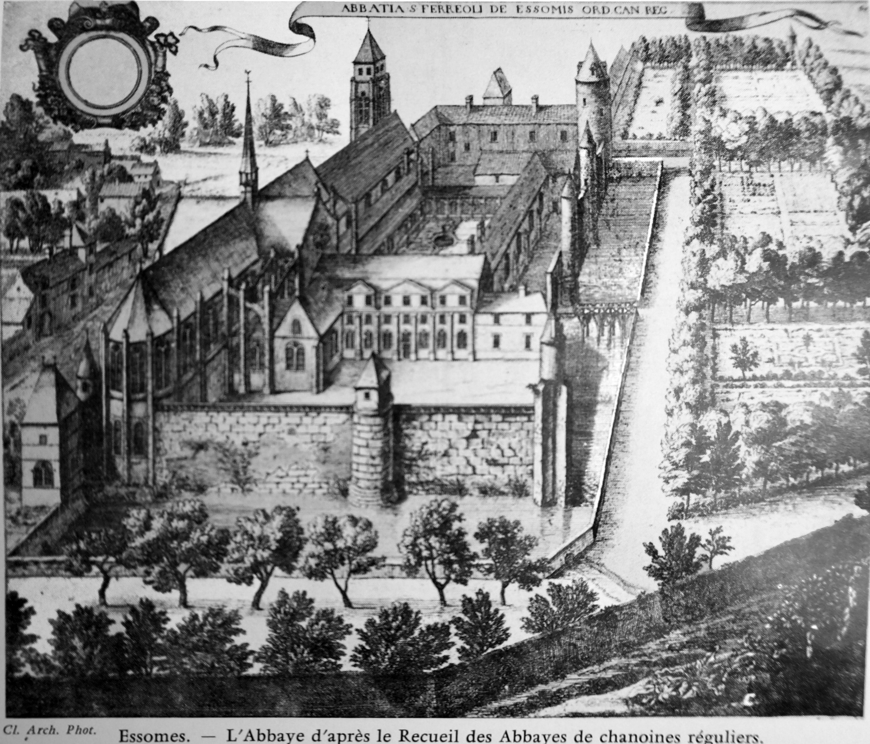 gravure ancienne de l'abbaye d'Essomes.